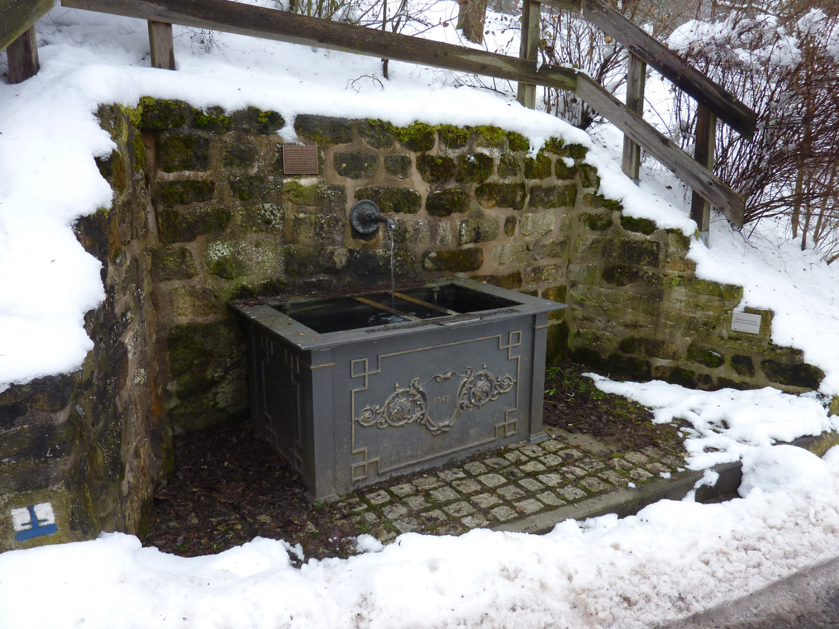 Gerechtigkeitsbrünnele in Esslingen-Obertal